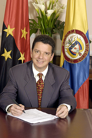 Luis Miguel Navia